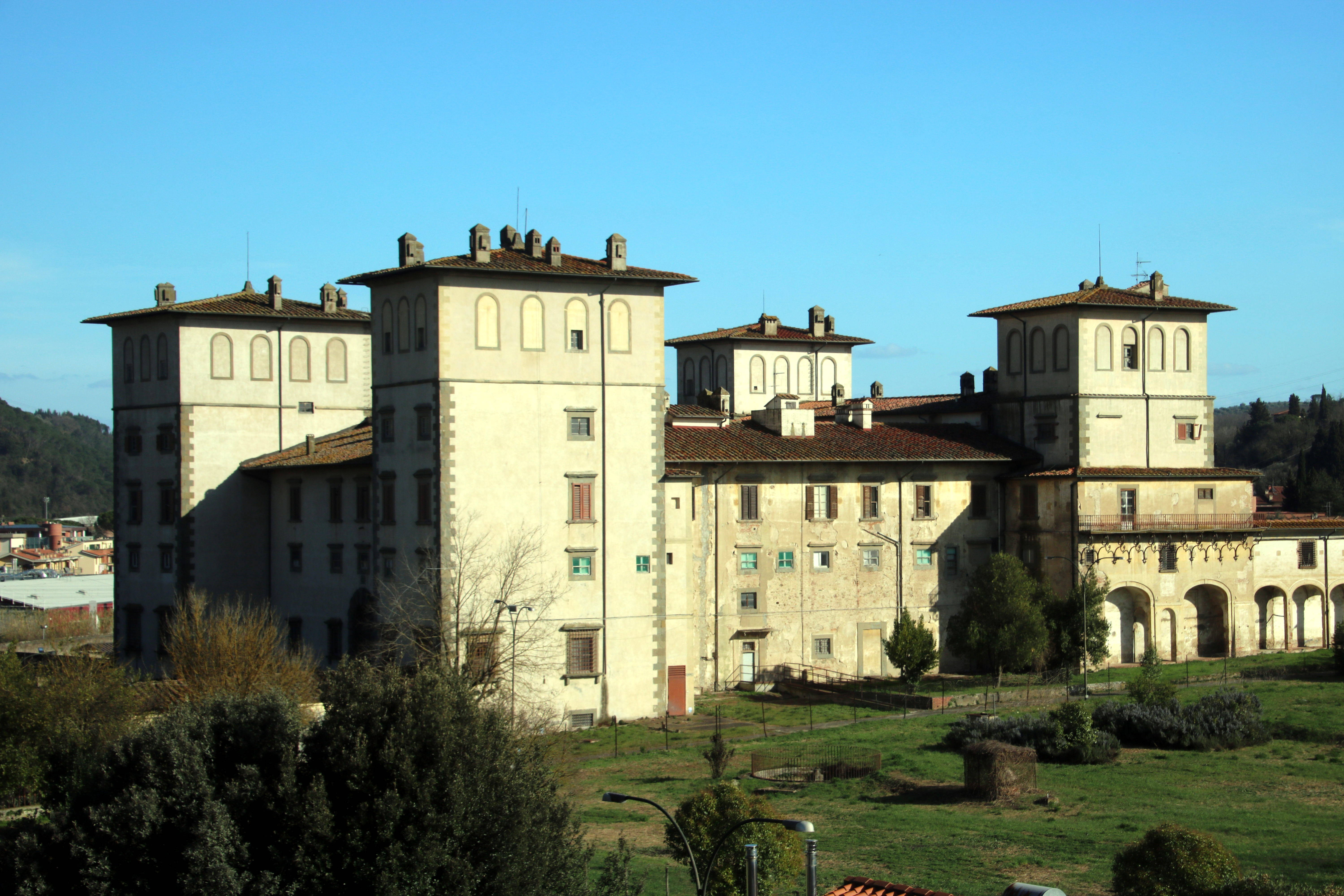 Villa Medicea dell'Ambrogiana (Montelupo Fiorentino)